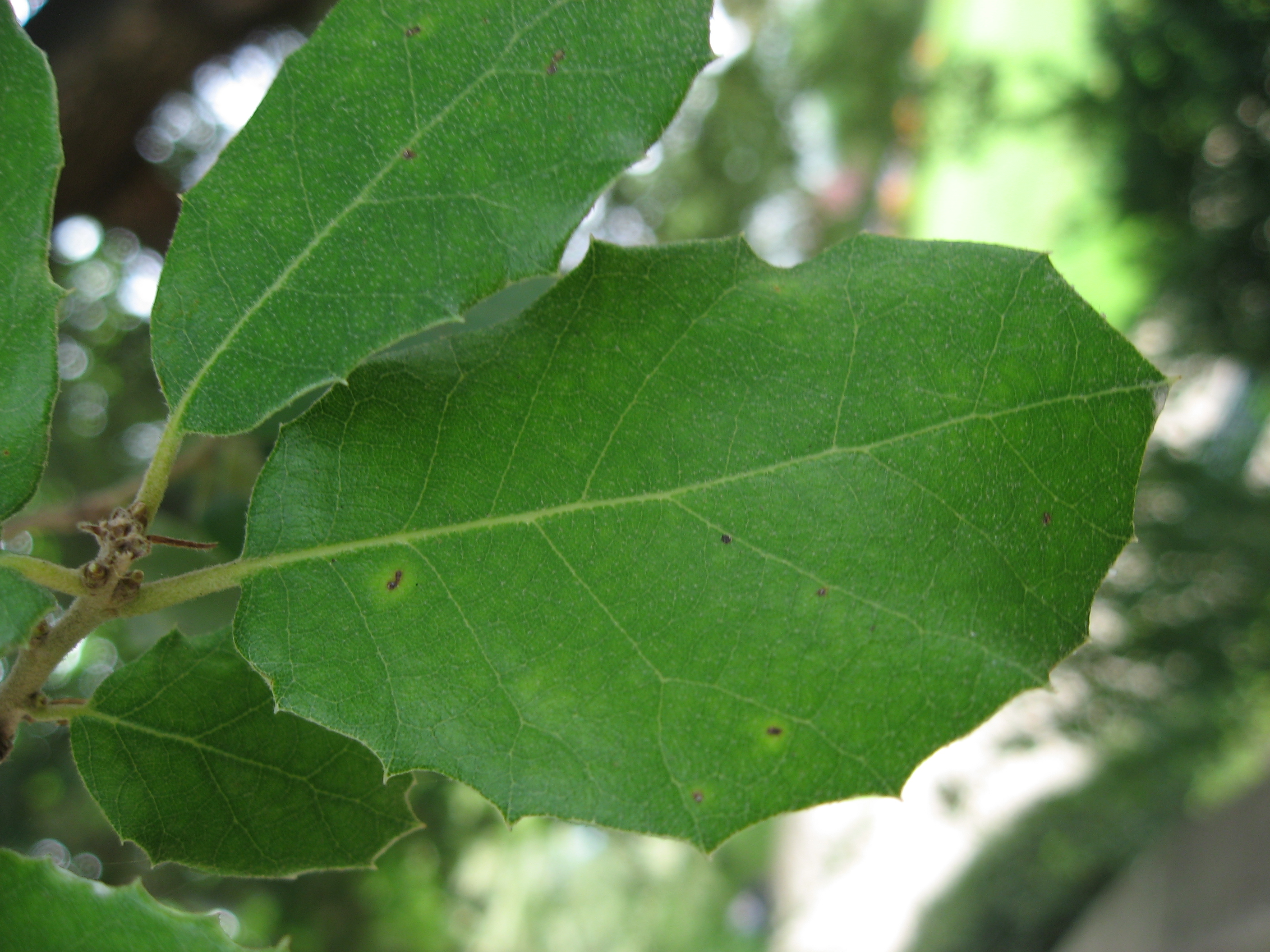 Quercus ilex in Serres d'Auteuil Map: 48° 50' 49" N 2° 15' 8" E